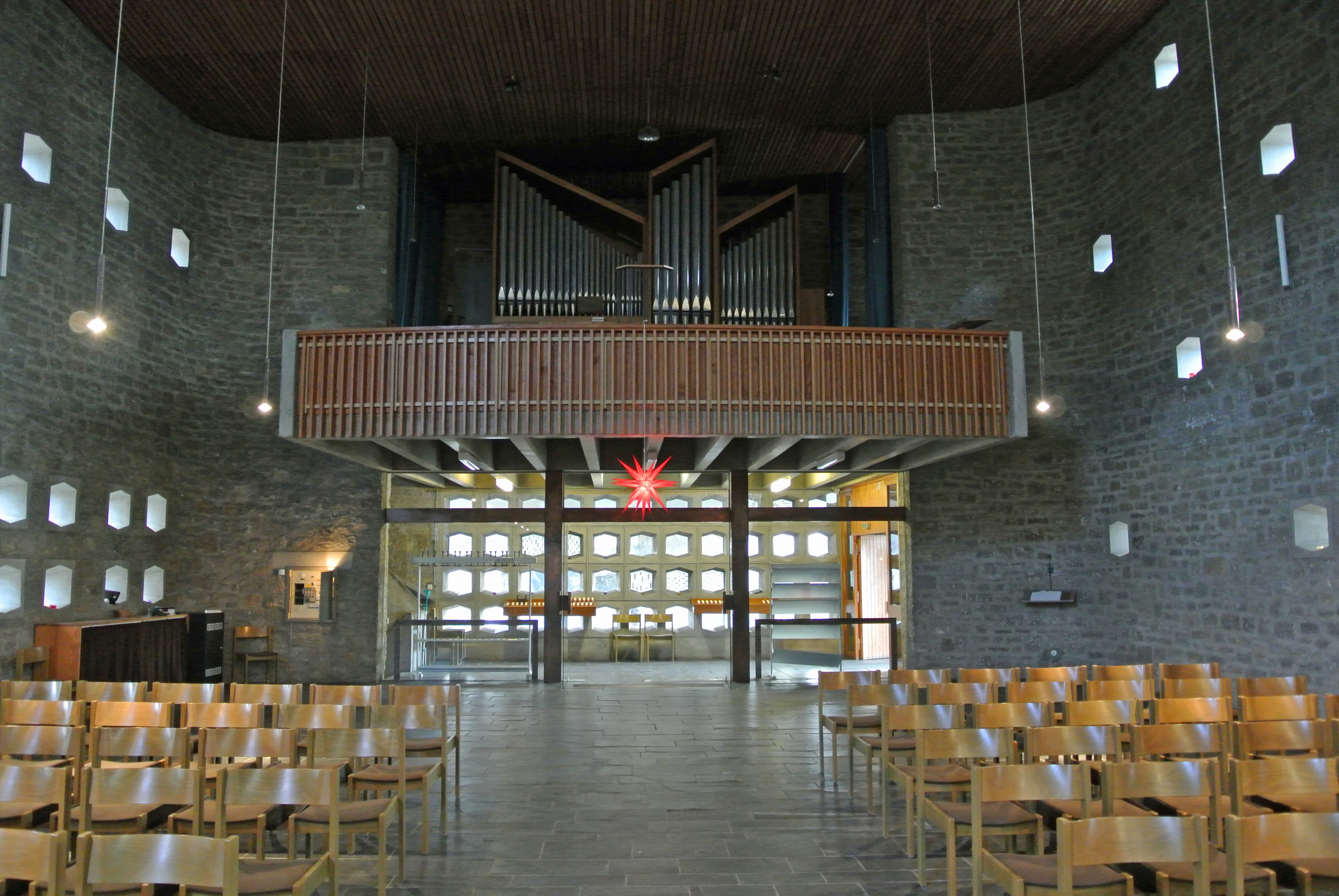 Dreifaltigkeitskirche in Frankfurt-Bockenheim-Kuhwaldsiedlung, Architekt: Werner Neumann, 1966 eingeweiht, Innenraum, Orgelempore